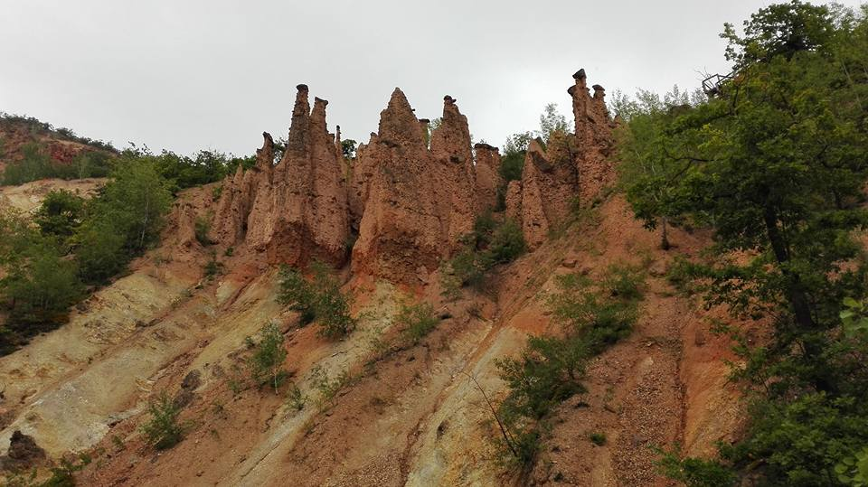 Đavolja varoš, Srbija